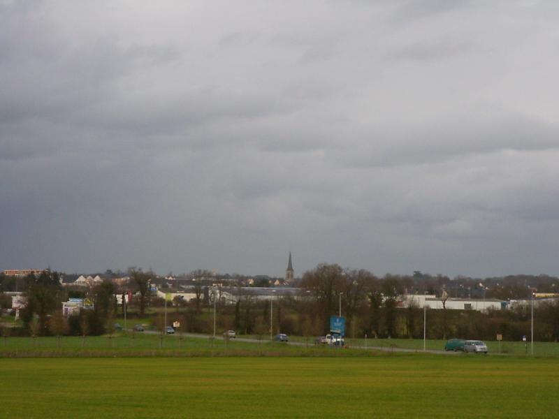 Chantepie vue par le sud, depuis la vallée du Blosne.